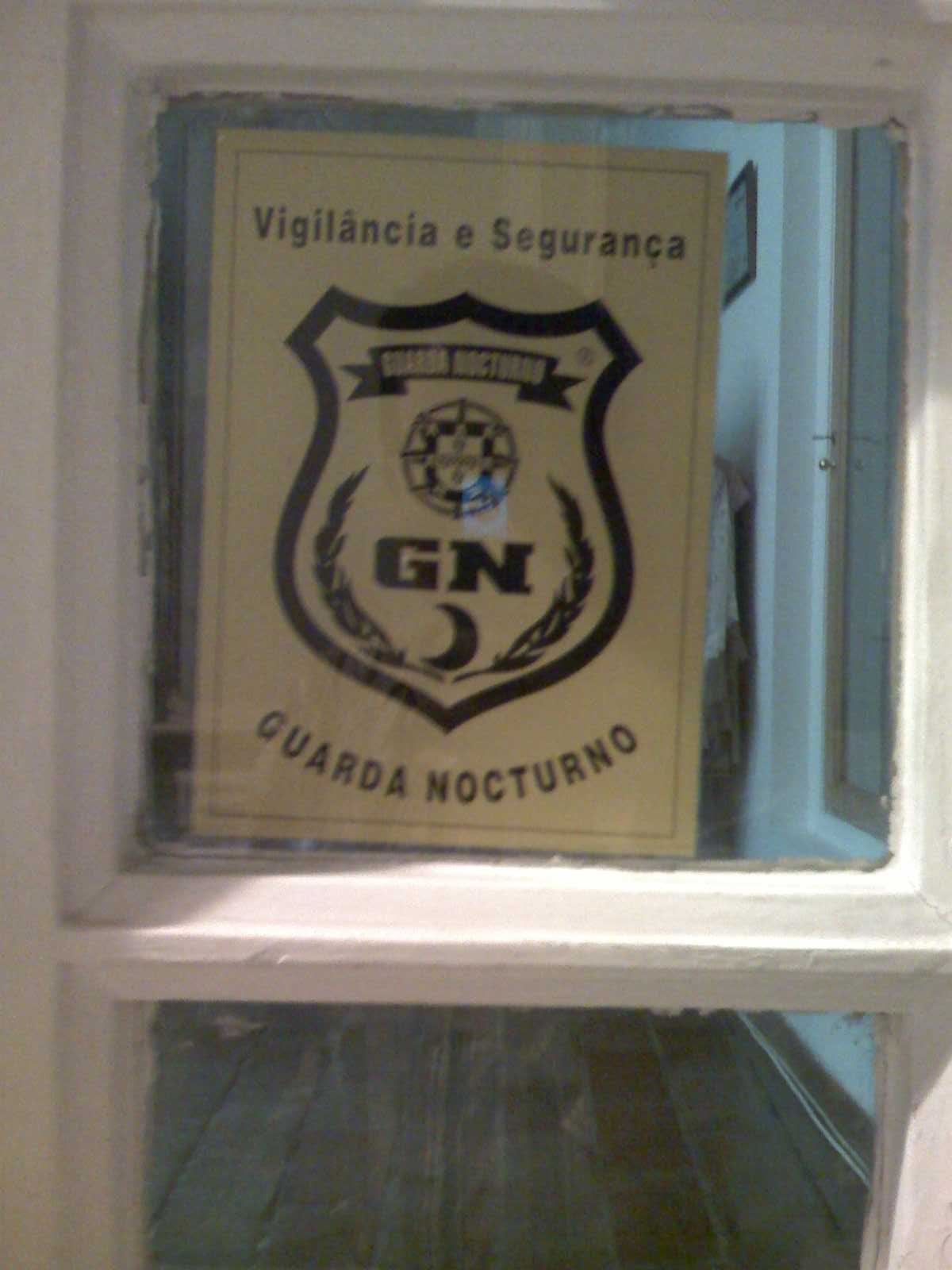 Distintivo de Guarda Nocturno colado numa loja portuguesa